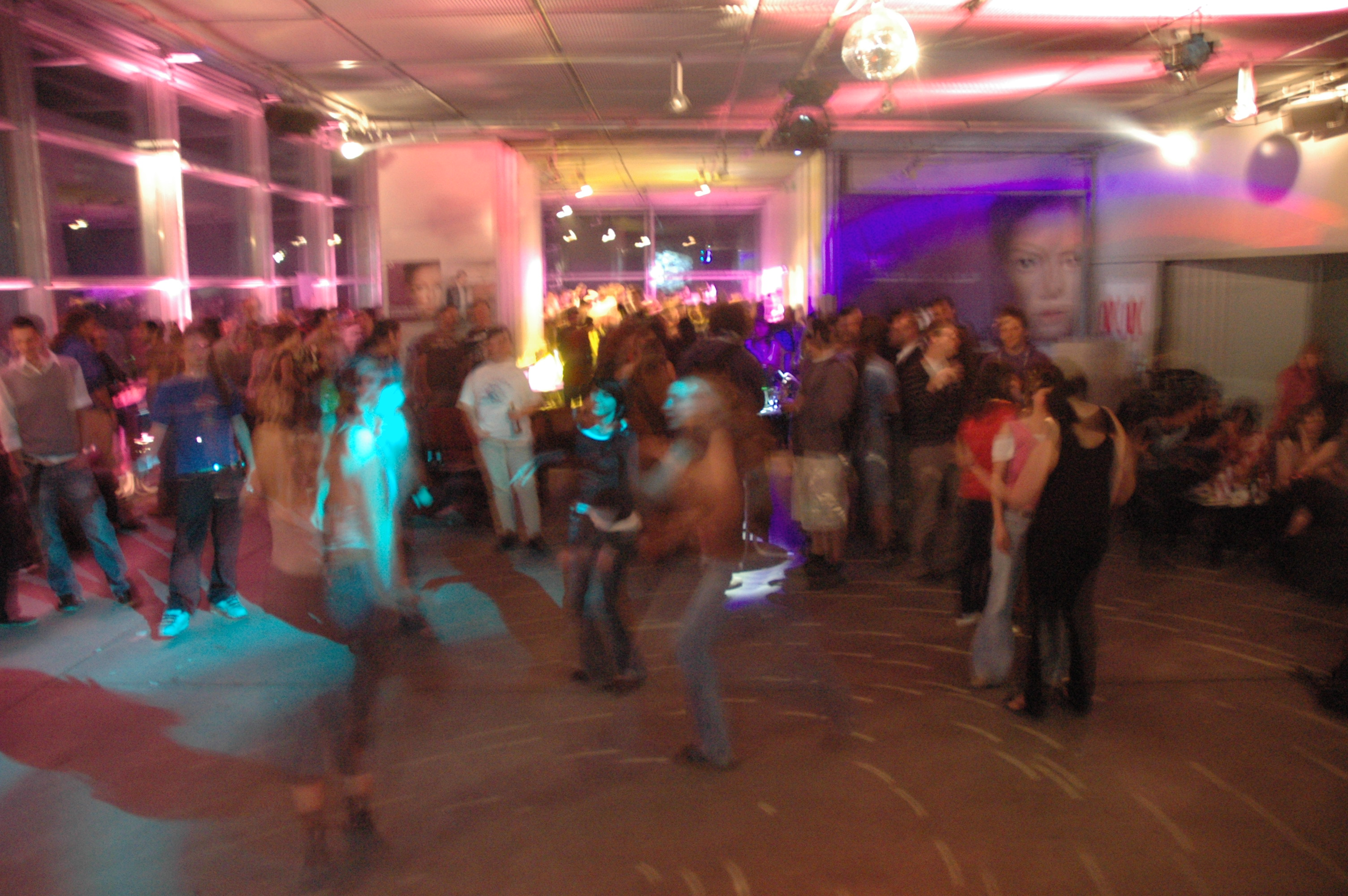 Nightline des Linzer (Oberösterreich) Filmfestivals "Crossing Europe" 2007, Donnerstag-Nacht im "Mediendeck" (Dachgeschoss) des "OK Zentrums für Gegenwartskunst".